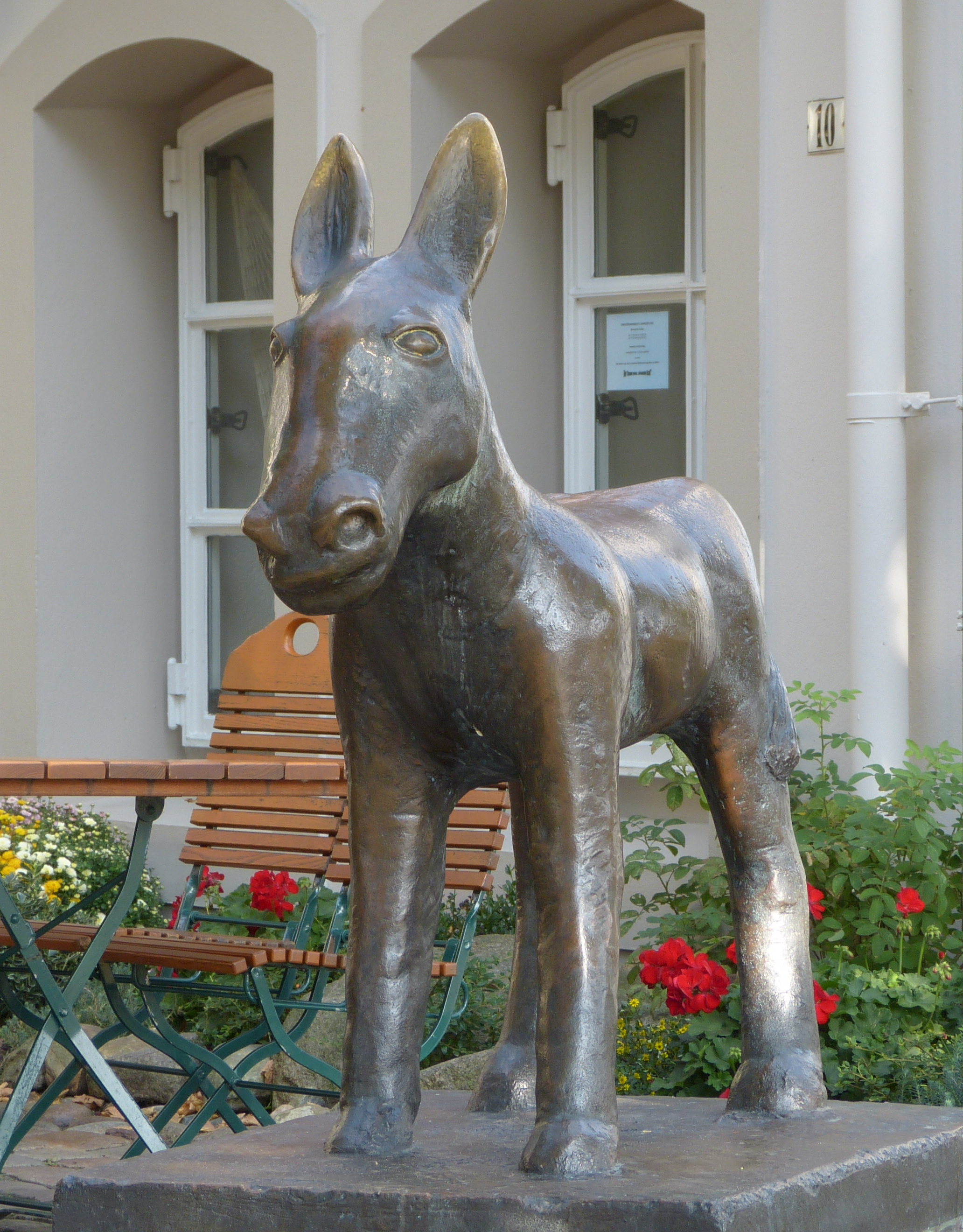 Esel, Bronze, Am Vegesacker Hafen